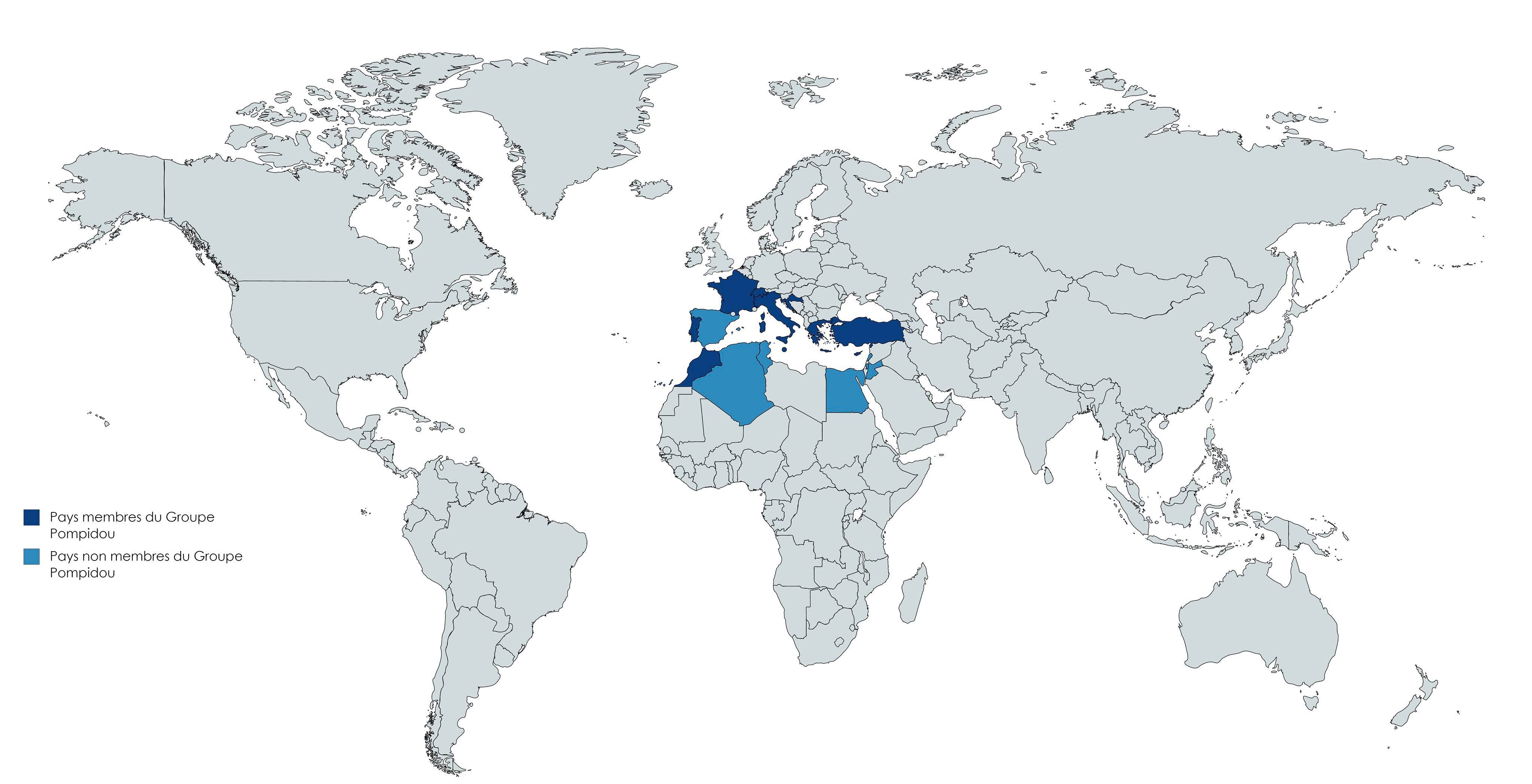 La carte représente les Etats membres du réseau MedNet: 10 pays qui font partie du Groupe Pompidou et 7 pays qui ne le sont pas. La carte est réalisée avec le logiciel "Mapchart".